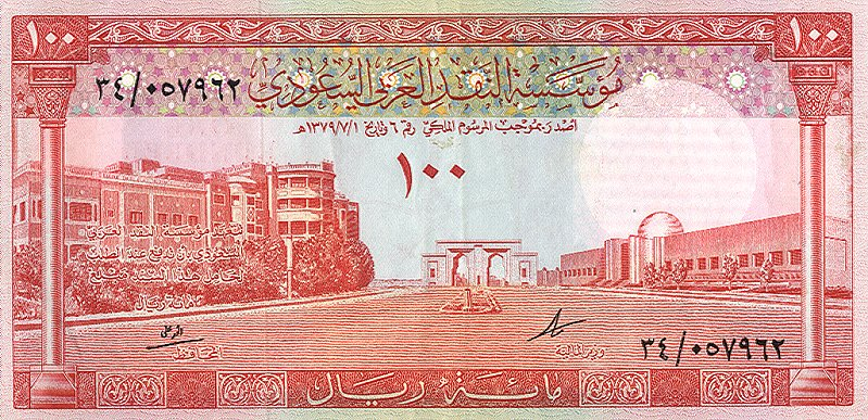 100 риалов. Саудовская Аравия, обр. 1961. Аверс.